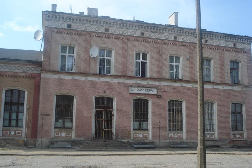 BARCZEWO: Dworzec PKP